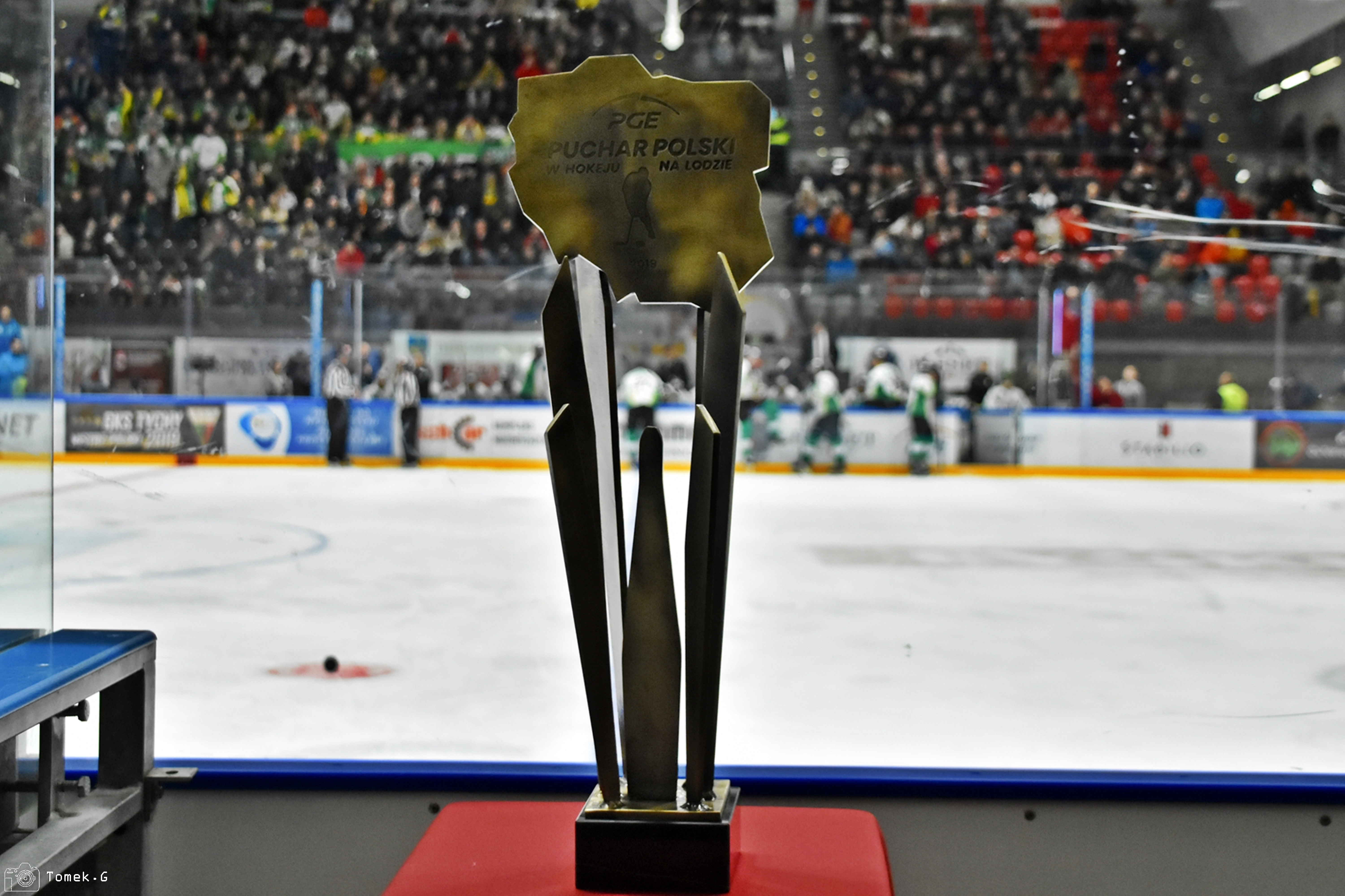 Puchar Polski w Hokeju na Lodzie 2019/2020